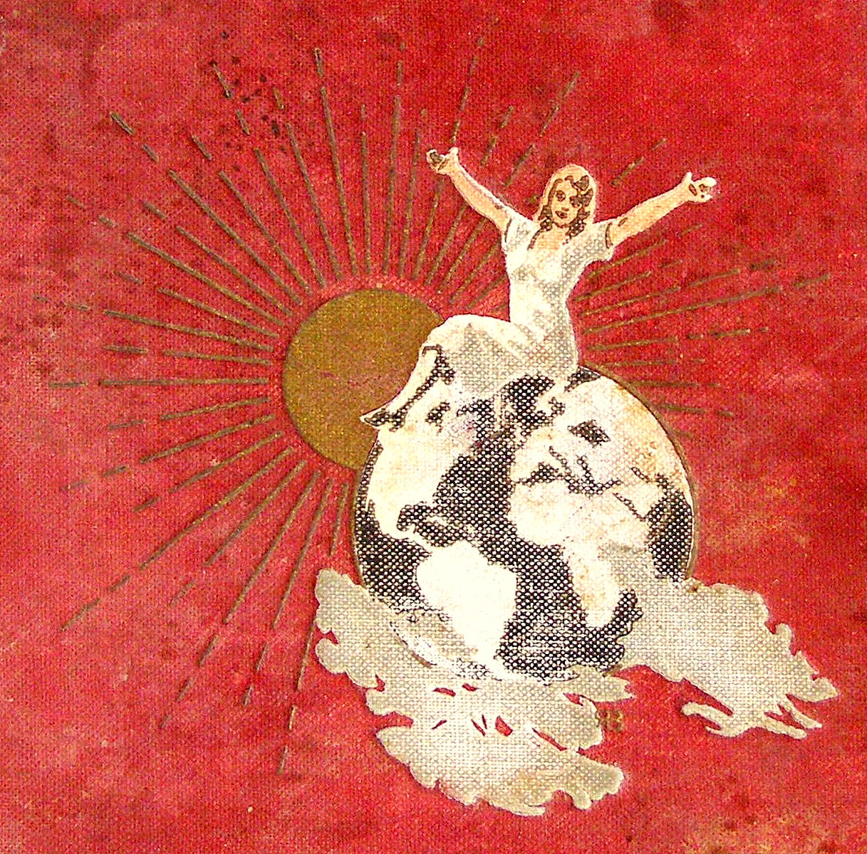 Digitalizovaný obrázok- detail z obalu knihy Praktická hospodyňka napísanej v češtine, z obdobia existencie 1. Československej republiky. Rok vydania knihy 1929.